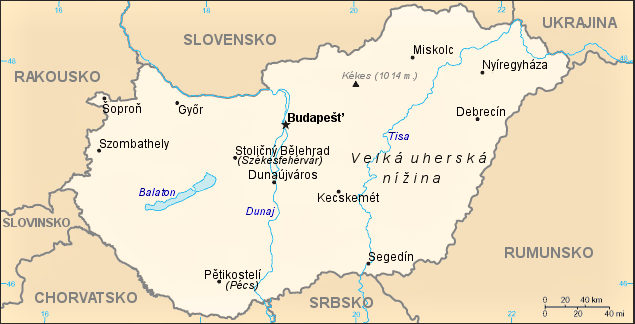 Orientační mapa Maďarska.